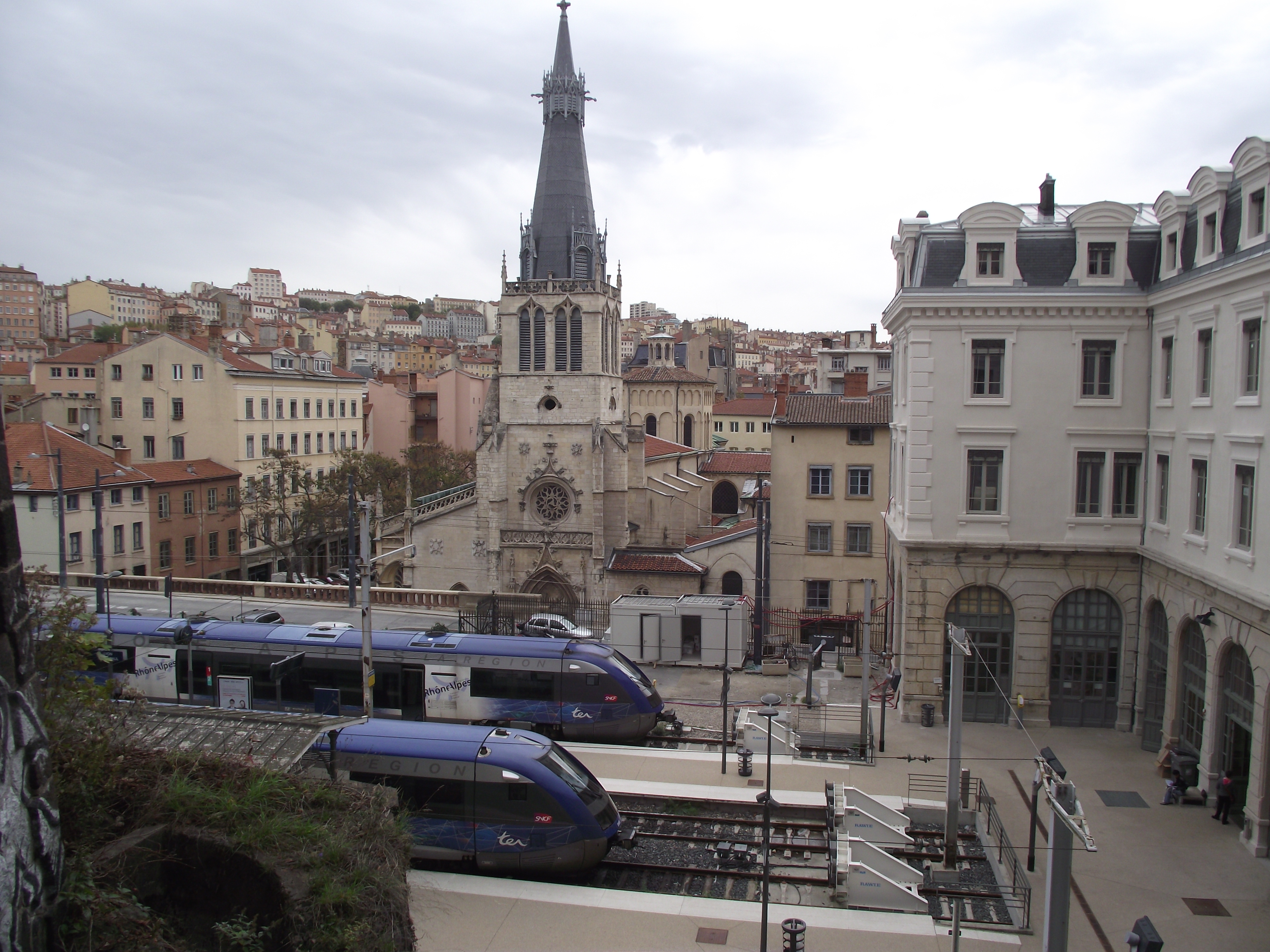 Station Lyon Saint-Paul van bovenaf gezien met X 73500 autorails